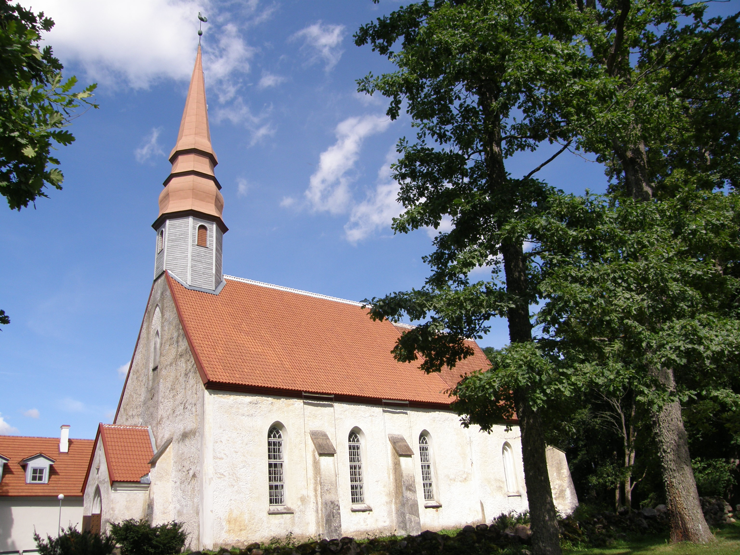 Palamuse kirik